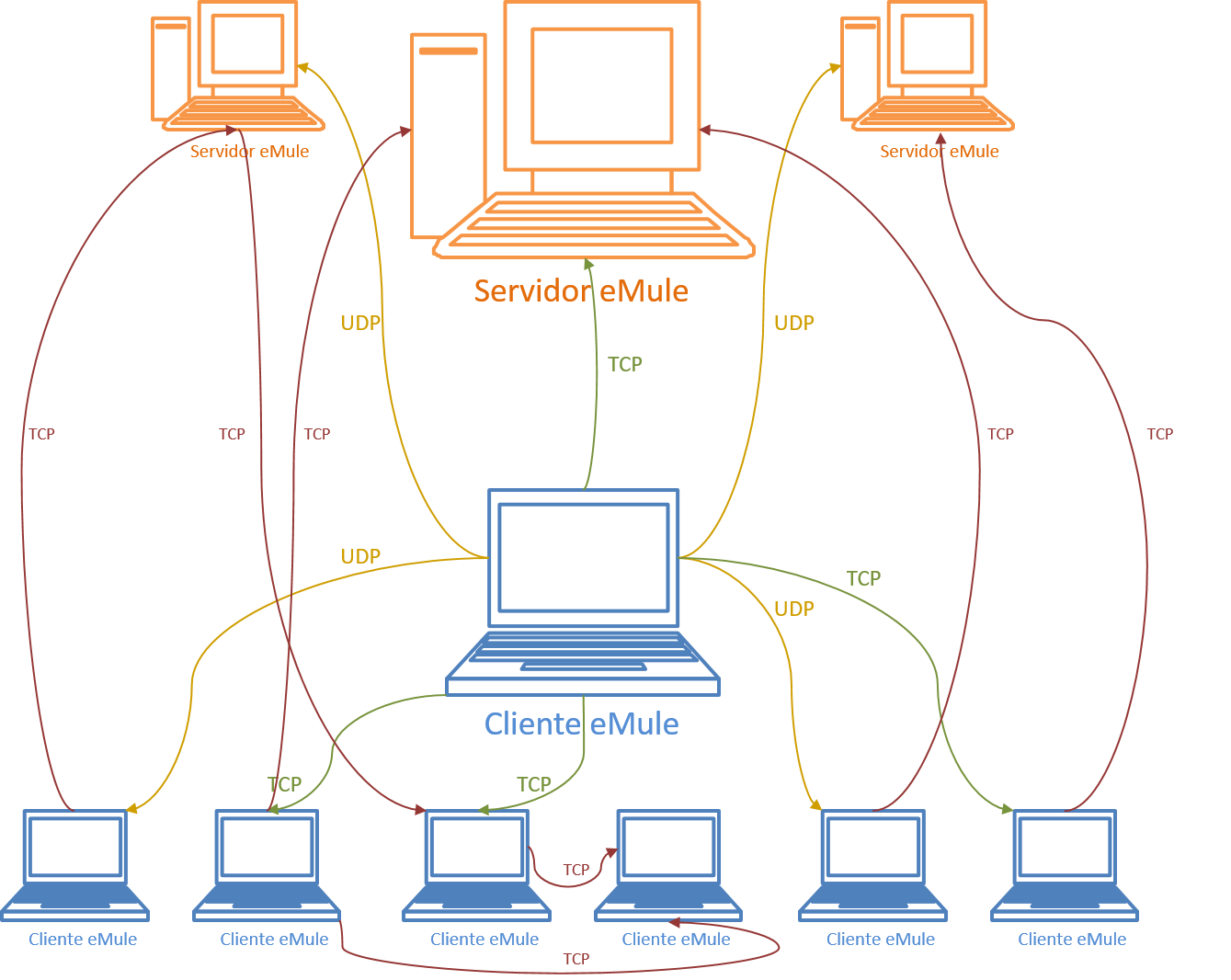 Muestra un ejemplo de una red eMule